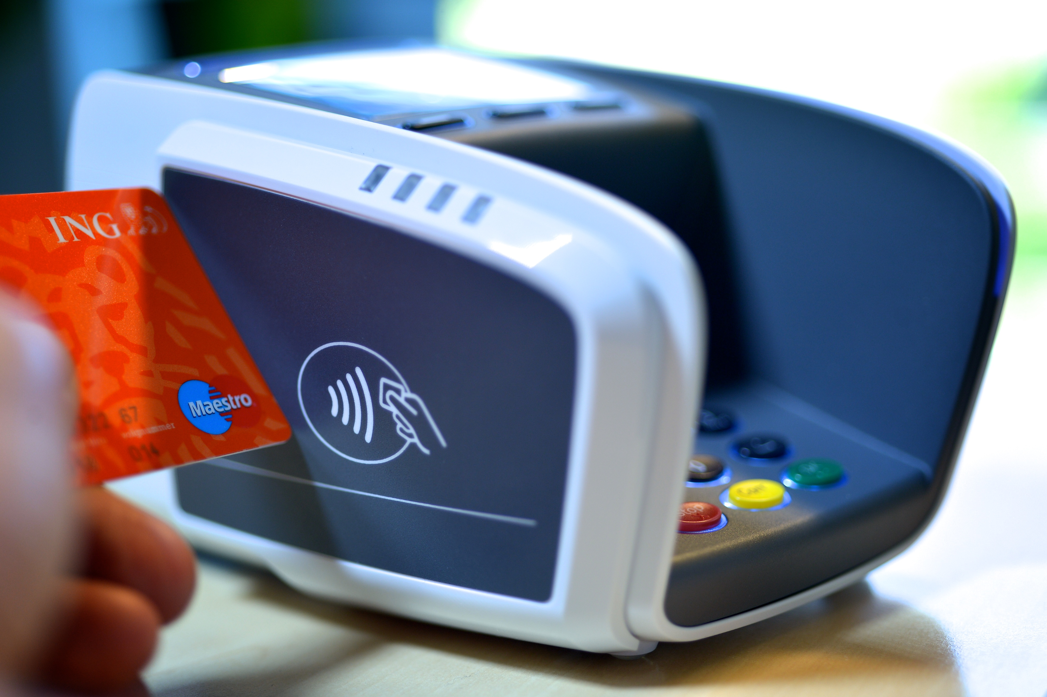 Een pinautomaat met NFC-chiplezer en pinpas.